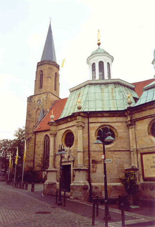 Marien-Wallfahrtskapelle vor der St.-Clemens Propstei-Kirche